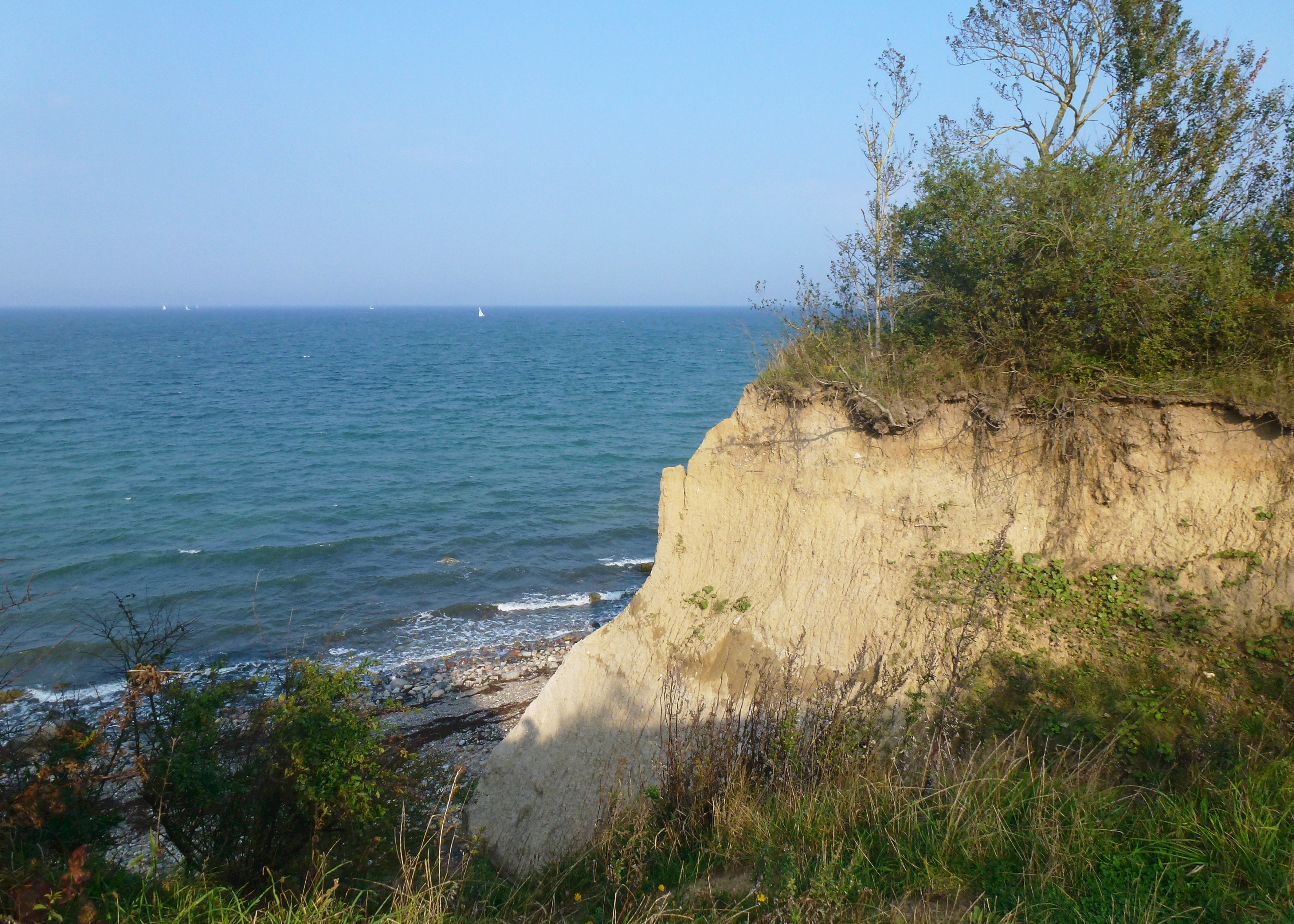 Brodtener Ufer, süden